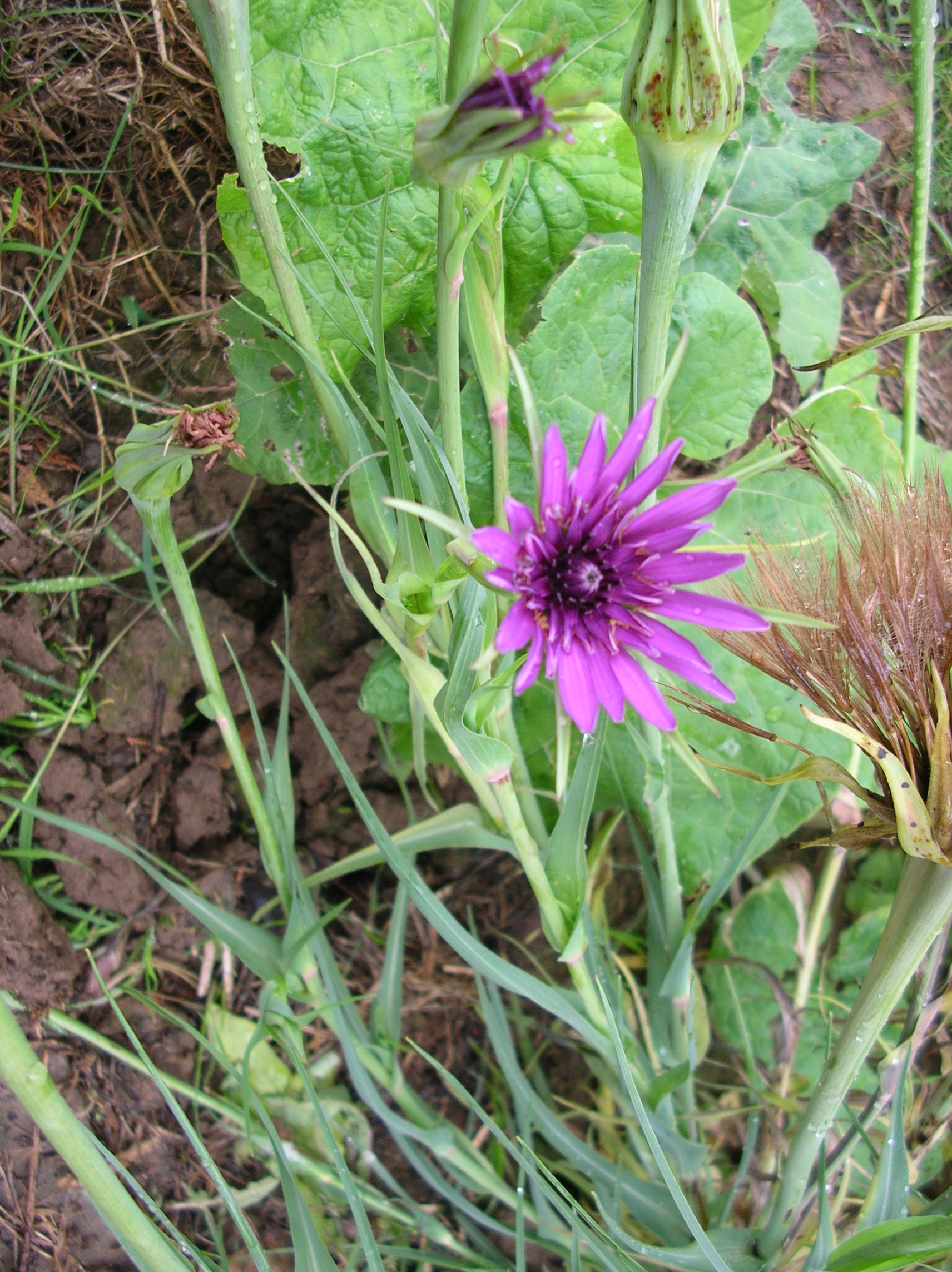 purpura tragopogona floro